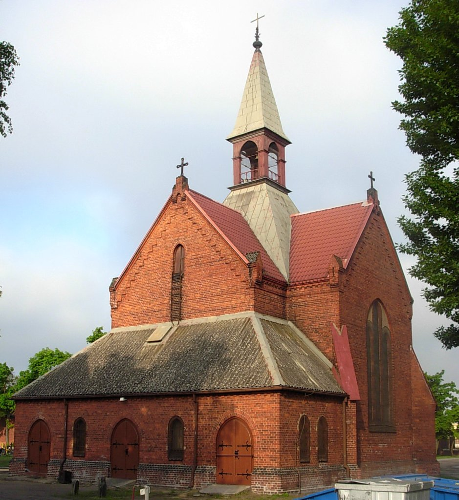 Cmentarz ewangelicko-augsburski Bydgoszcz. Kaplica